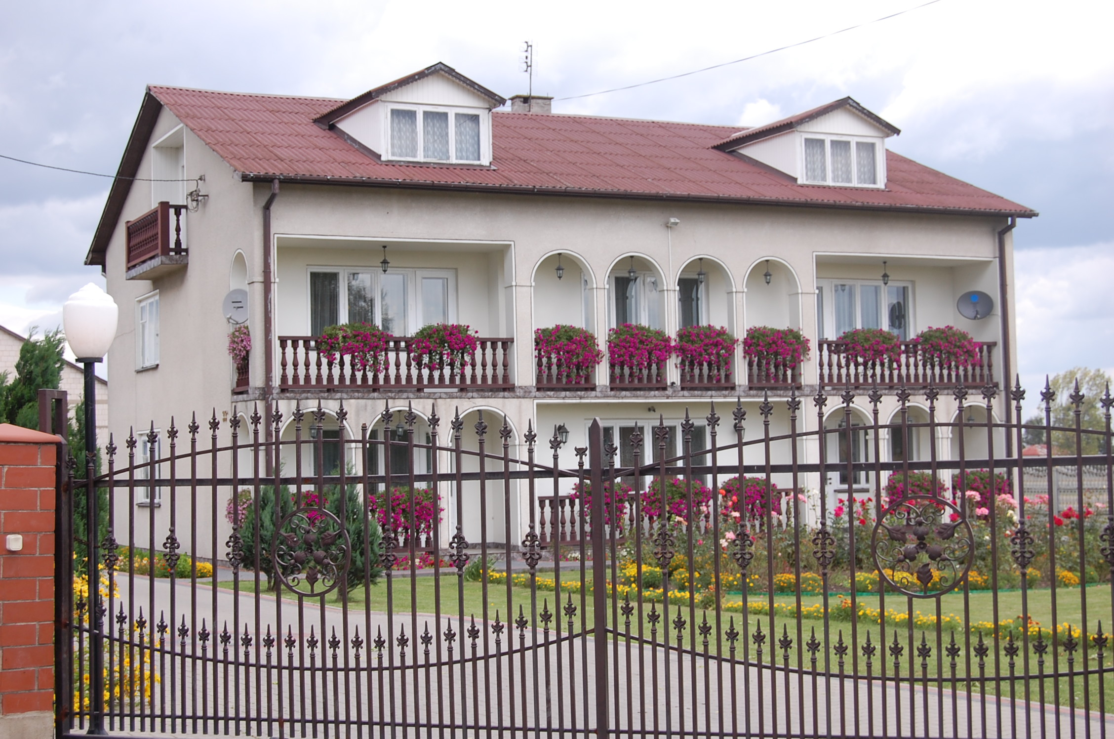 Latowicz Rozstanki (Serial Ranczo: dom wójta).